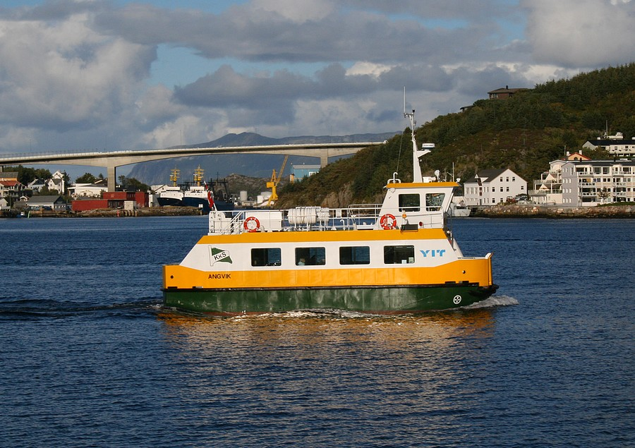 Sundbåten